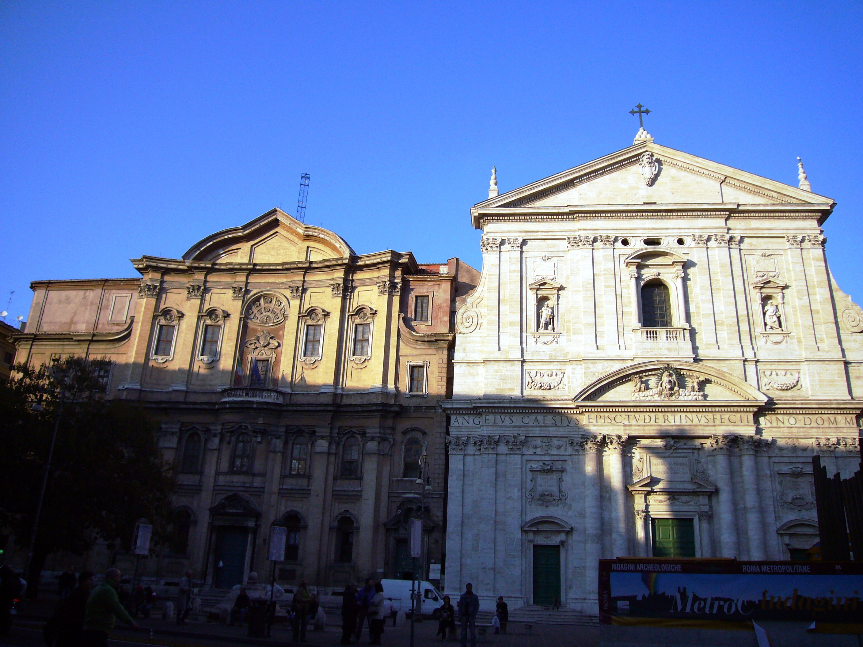 Roma, piazza della Chiesa Nuova: Oratorio dei Filippini e Santa Maria in Vallicella